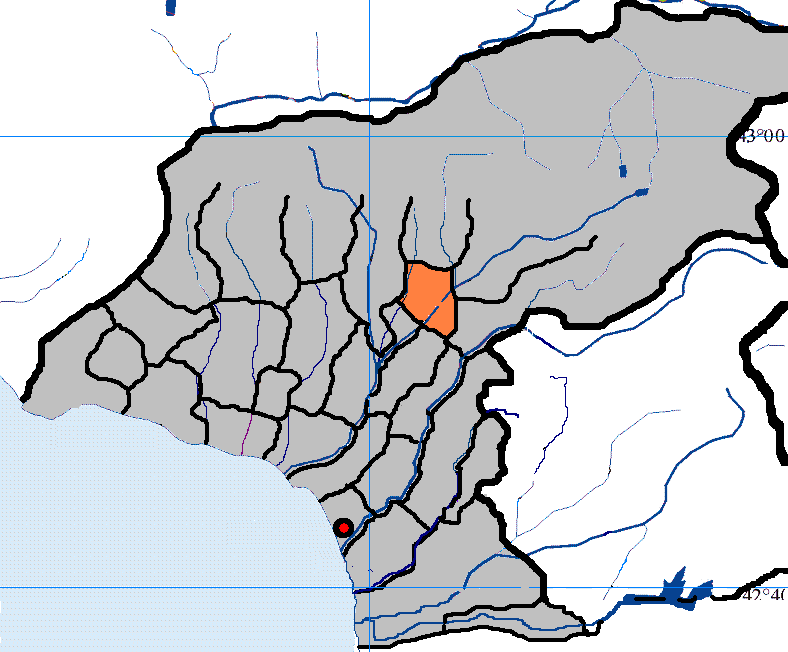 село Тхина в Очамчирском районе